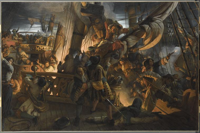 Abordage d'un vaisseau hollandais par Jean Bart le 29 juin 1694. Salon 1843